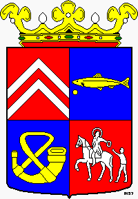 Gemeentewapen Harenkarspel